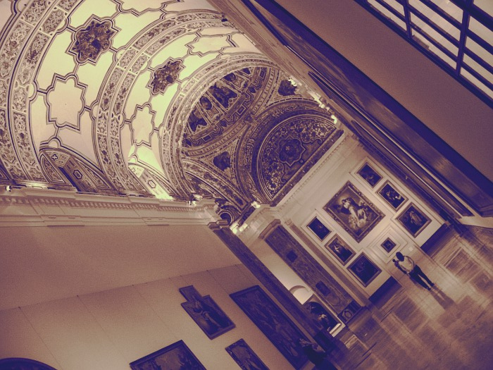 Museo de Bellas Artes, Sevilla